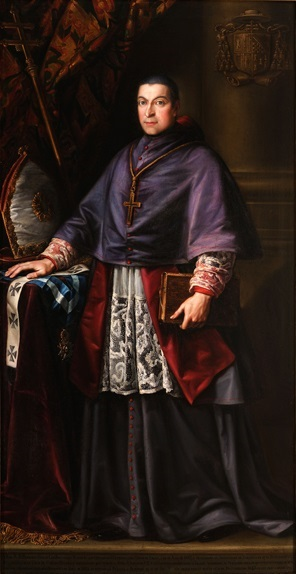 Retrato del eclesiástico español Bernardo Francés Caballero (1774-1843), que llegó a ser obispo de Urgel y arzobispo de Zaragoza.